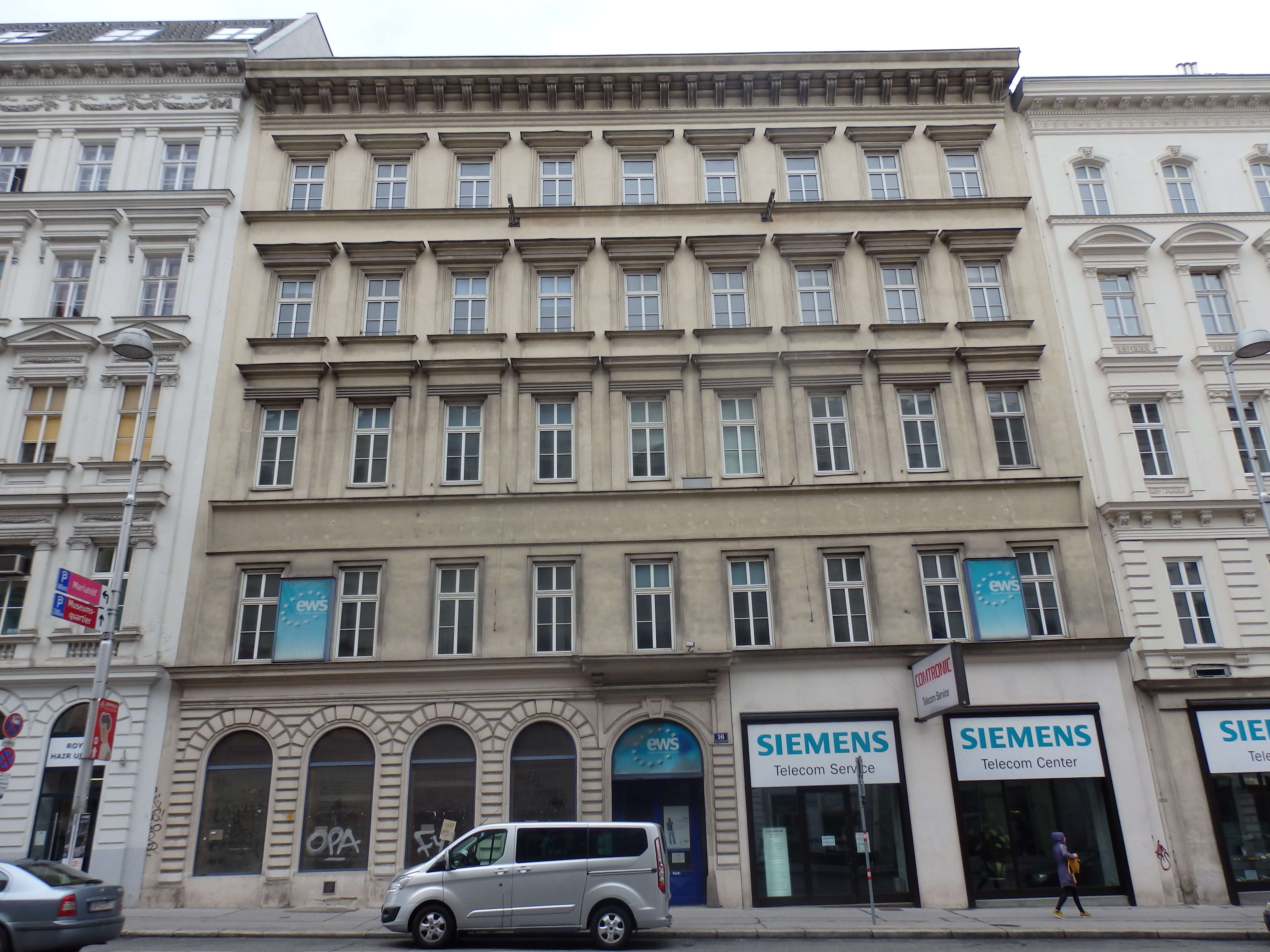 Haus (1868) von Anton Huber, Getreidemarkt 16, Wien-Innere Stadt